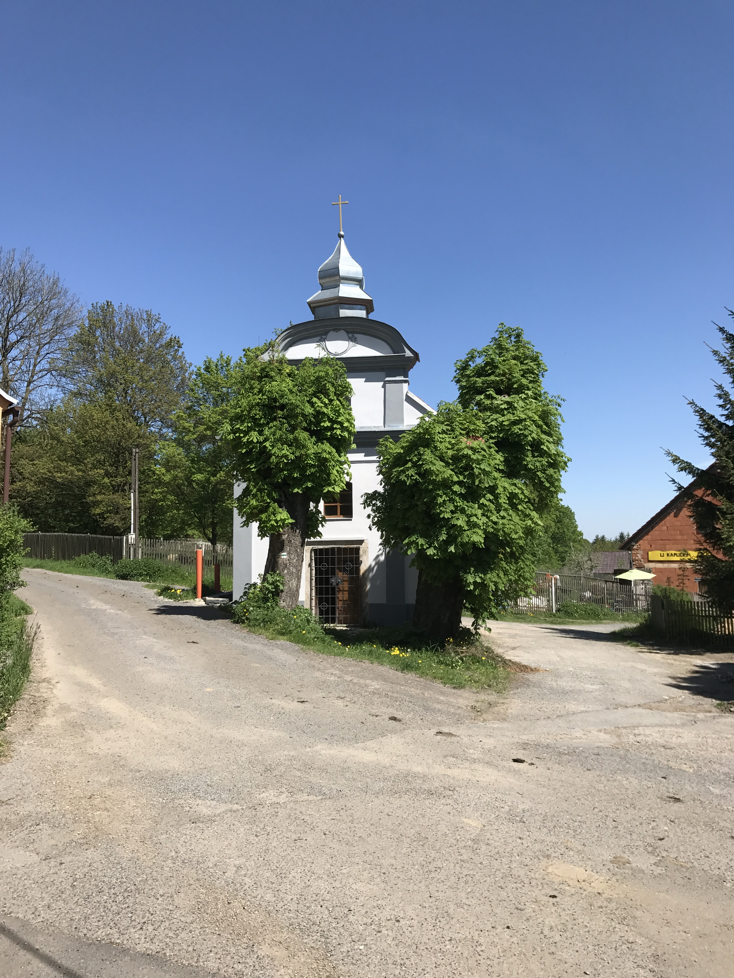 Velká Javorská, kaple Nejsvětější Trojice, celkový pohled